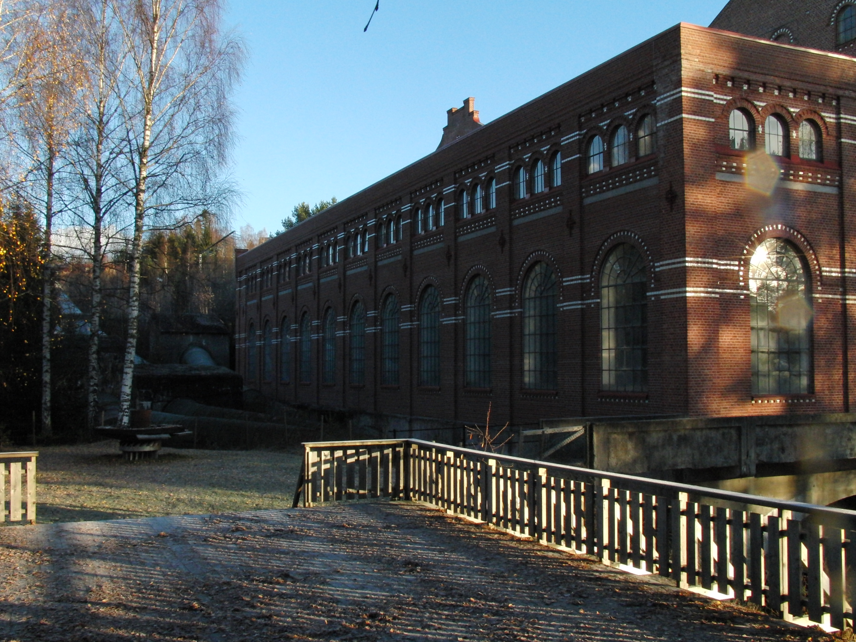 Gamle Labro kraftverk, nedlagt